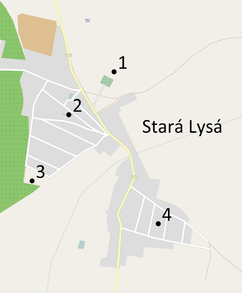 Stará Lysá, archeologická naleziště. 1. tuhové střepiny a vypichovaná keramika v lokalitě "Na Ostrově"; 2. dvě kostry knovízské kultury před domem čp. 18; 3. dehtářská pec v lokalitě "Za Pecí"; 4. tuhové střepiny v lokalitě "Krchovíčko"This map of Stará Lysá was created from OpenStreetMap project data, collected by the community. This map may be incomplete, and may contain errors. Don't rely solely on it for navigation.